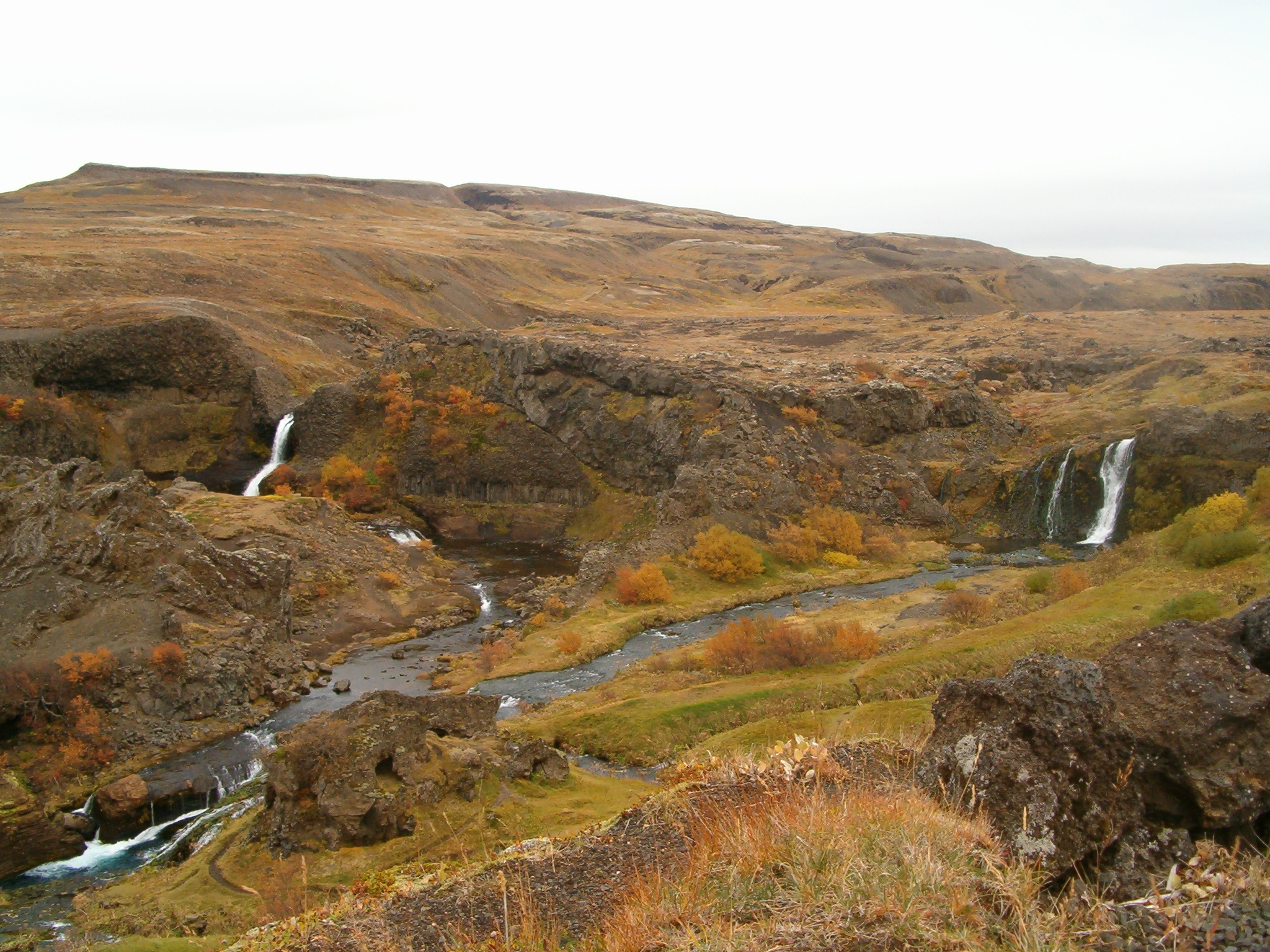 Gjáin.